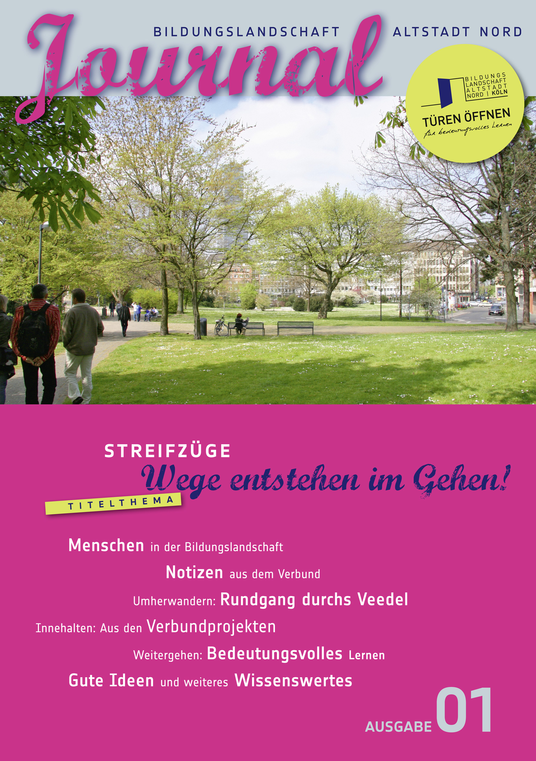 Cover des Projektjournals BAN